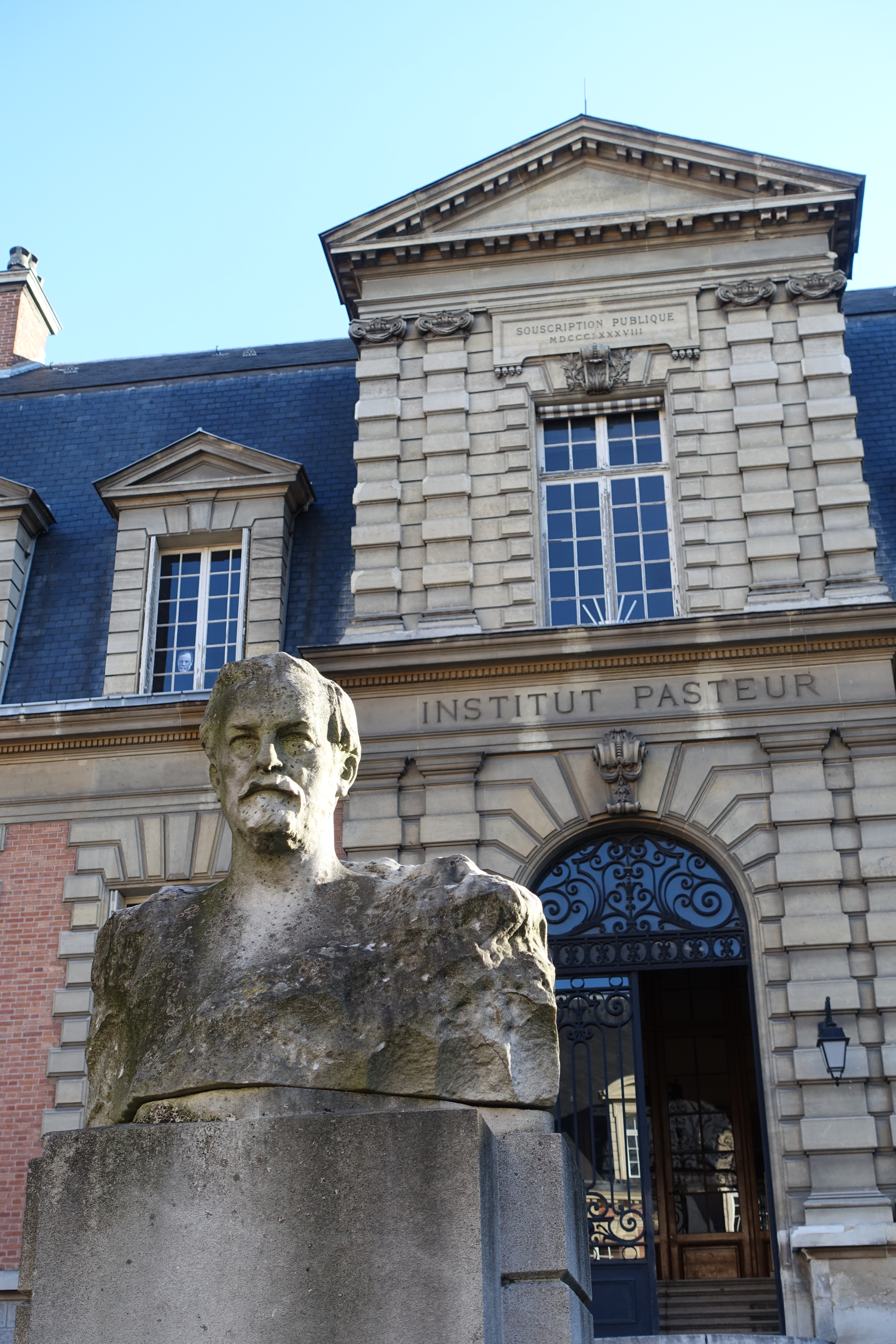 Statue of Louis Pasteur @ Institut Pasteur @ Paris